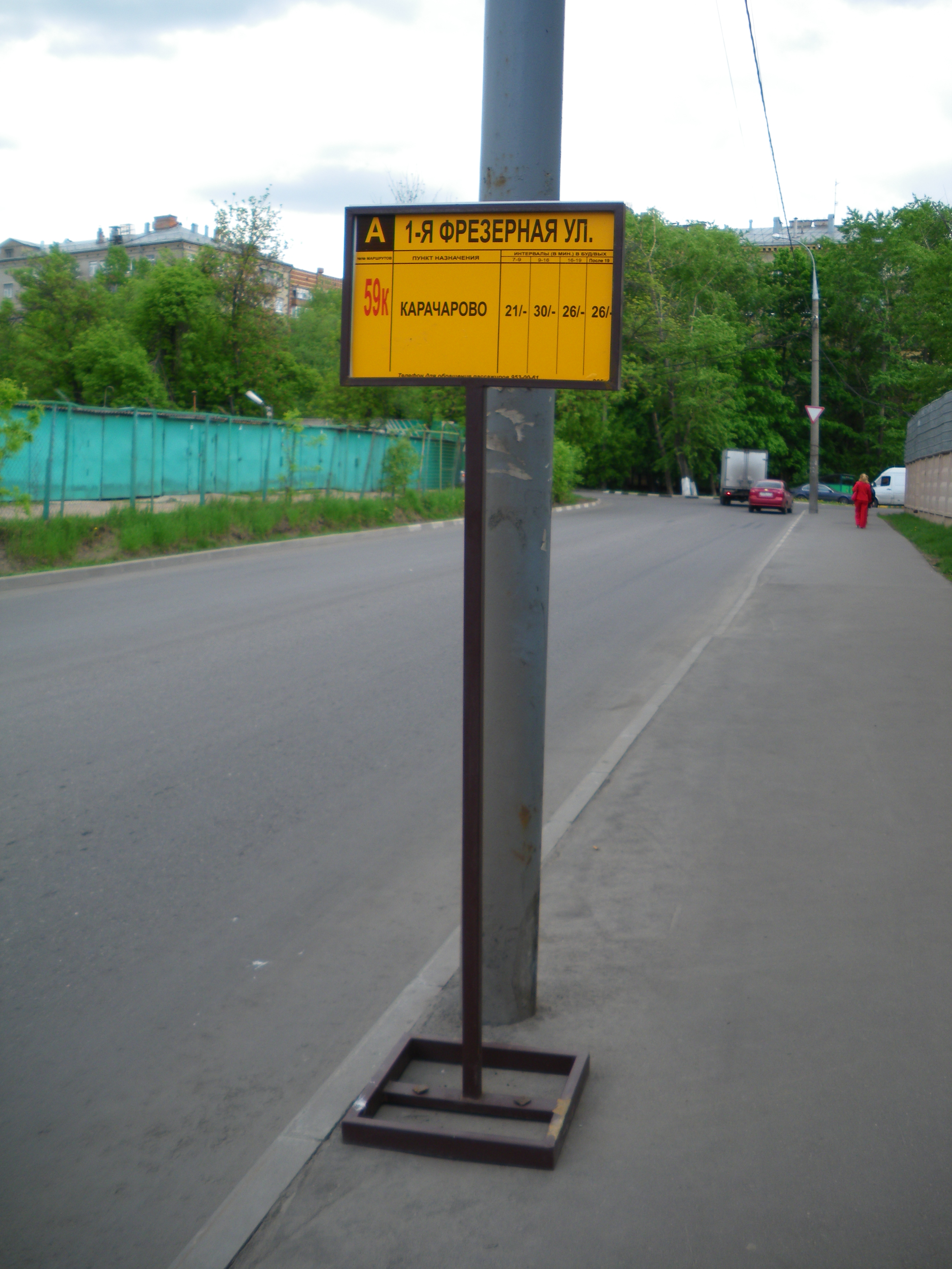 табличка на остановке "1я Фрезерная улица" по маршруту автобуса 59к, Москва.